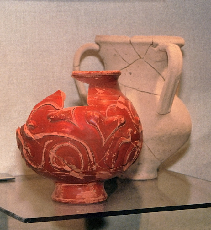 Visegrád-Lepence (Burgus Solva 23) – Ungarn: Im Umfeld eines vor 214 n. Chr. errichteten Limeswachturms fanden sich Siedlungsreste und ein Brandgräberfeld mit Waffenresten des 2. und 3. Jahrhunderts n. Chr. Vorne eine südgallische Sigillata vom Typ Dragendorff 54 mit herzblattförmigem floralen Dekor; daneben ein aus weißlichem Ton gefertigter Dreihenkelkrug. Aufgenommen während der provinzialrömischen Sonderausstellung „Visegrád évszázadai – A római kor kezdete a Dunakanyarban“ die vom 19.08.2011 bis 20.07.2012 im Mátyás Király Múzeum (König-Matthias-Museum), Visegrád, stattfand.